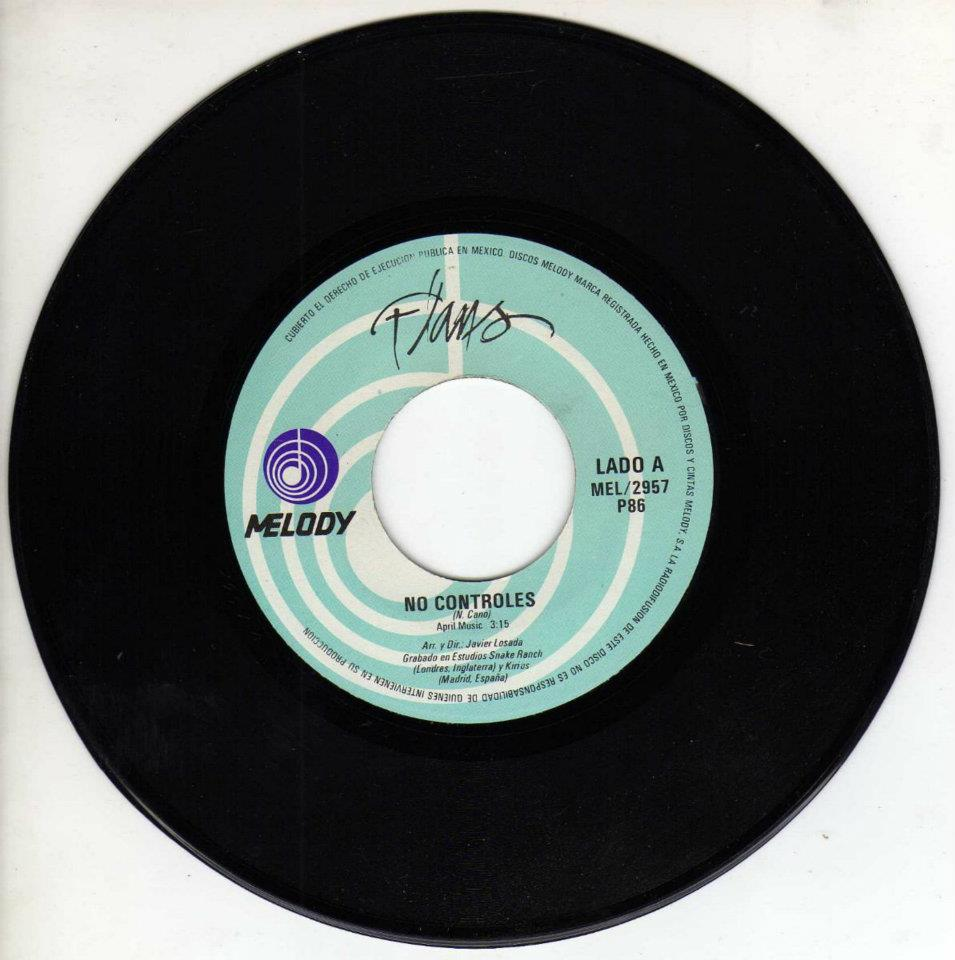 Single de No Controles